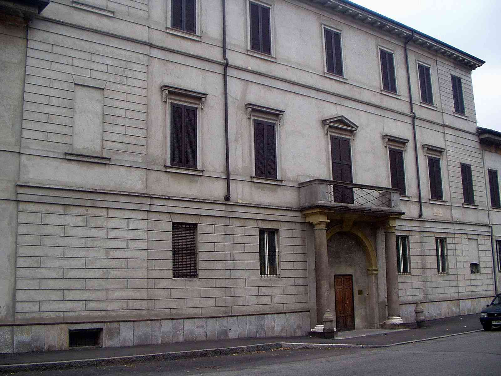 Villa Durini, detta la "Grassa", prospetto su via Carlo Rota a Monza